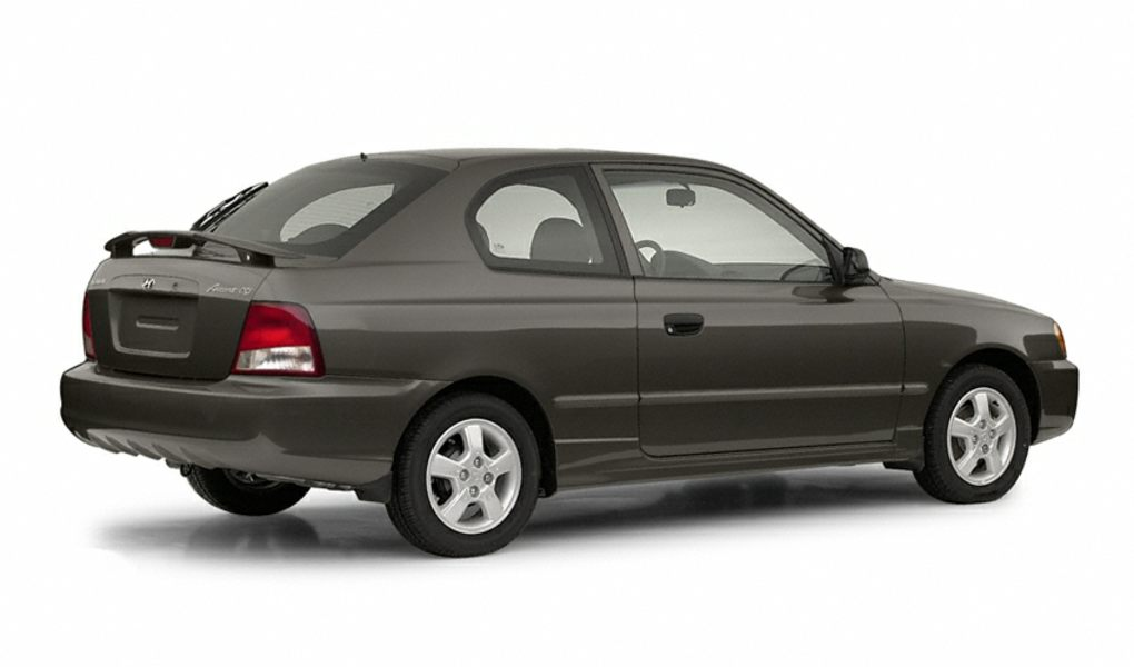 Hyundai Accent GT (2002) un liftback de 2 puertas muy popular en Europa y America